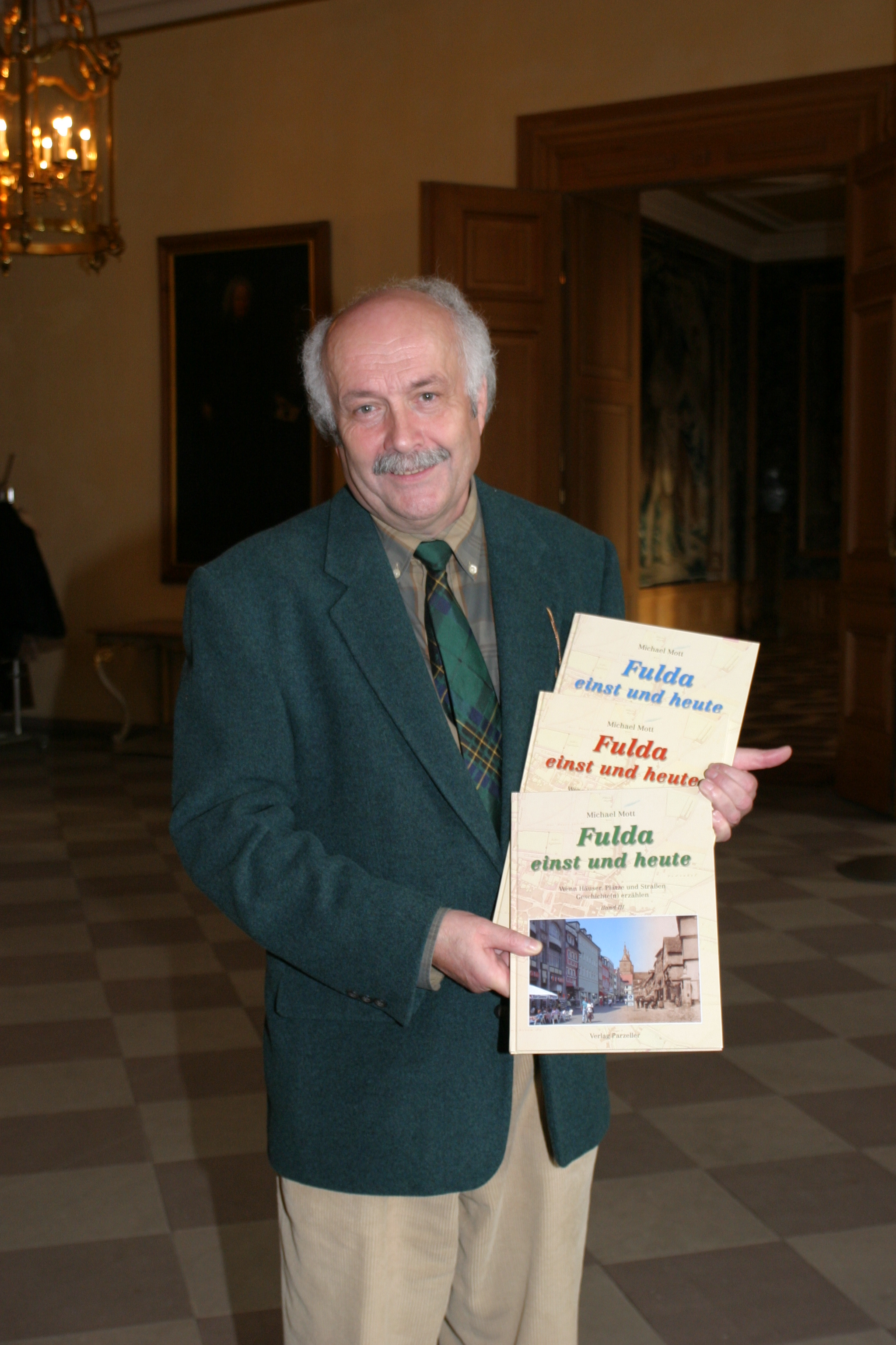 Der Heimatkundler, Denkmalpfleger, Journalist und Autor Michael Mott bei der Buchvorstellung seines dritten Bandes "Fulda einst und heute" im Dezember 2003 in der alten fürstlichen Fuldaer Residenz.